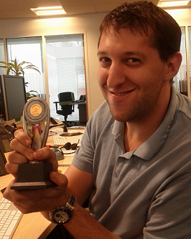 Ido Ajzdenstadt